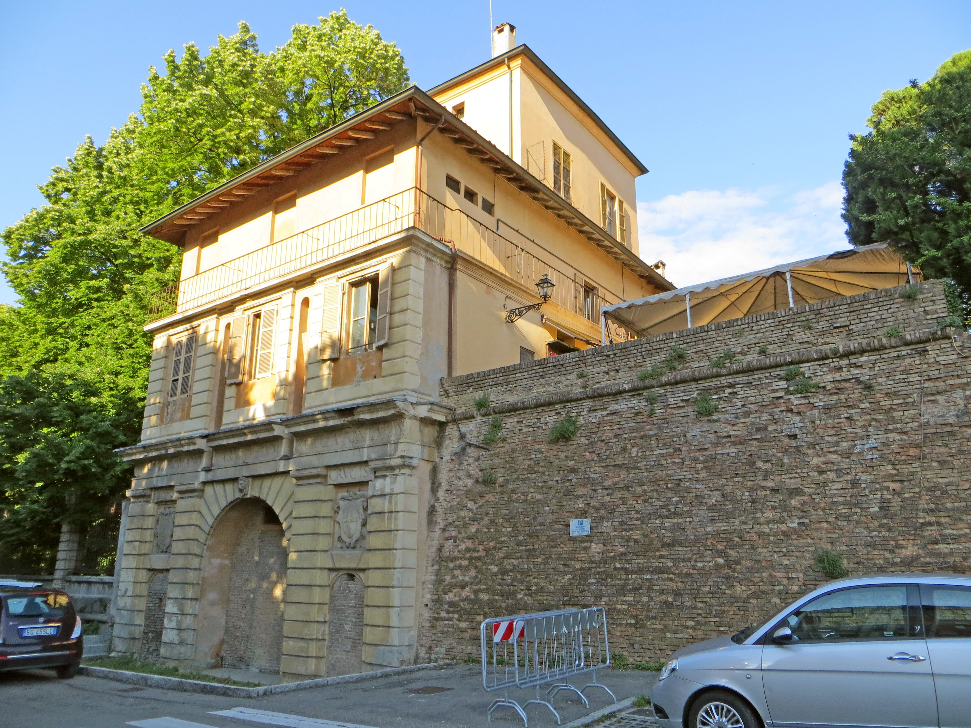 Porta Santa Croce (Parma) - prospetto esterno